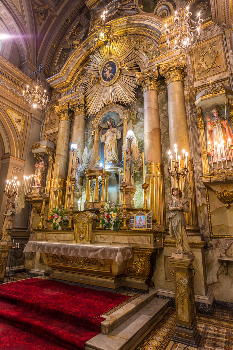 Hospital Maciel y Capilla de la Caridad. Ubicada en el departamento de Montevideo